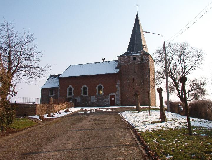 Chapelle Saint-Sulpice d'Aineffe (province de Liège), le 18 septembre 2005.